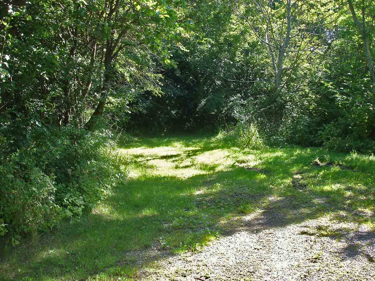 Roskilde-Kalundborg-banens oprindelige tracé V for Hvalsø S for Åsvejen 28